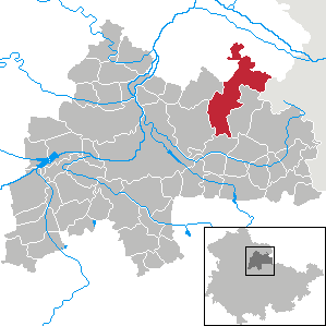 Großmonra in Thuringia - District Sömmerda